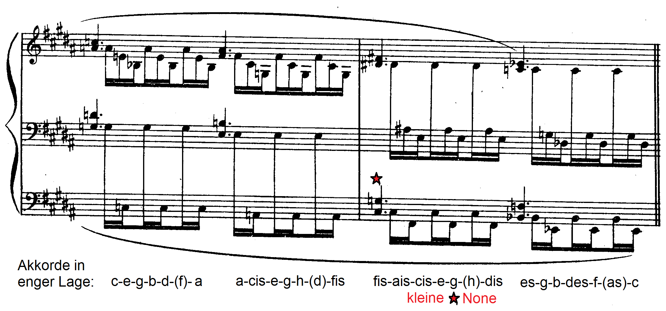 aus Nr. VIII der Préludes (Bd. 2) von Debussy, Parallelführung von Tredezimakkorden